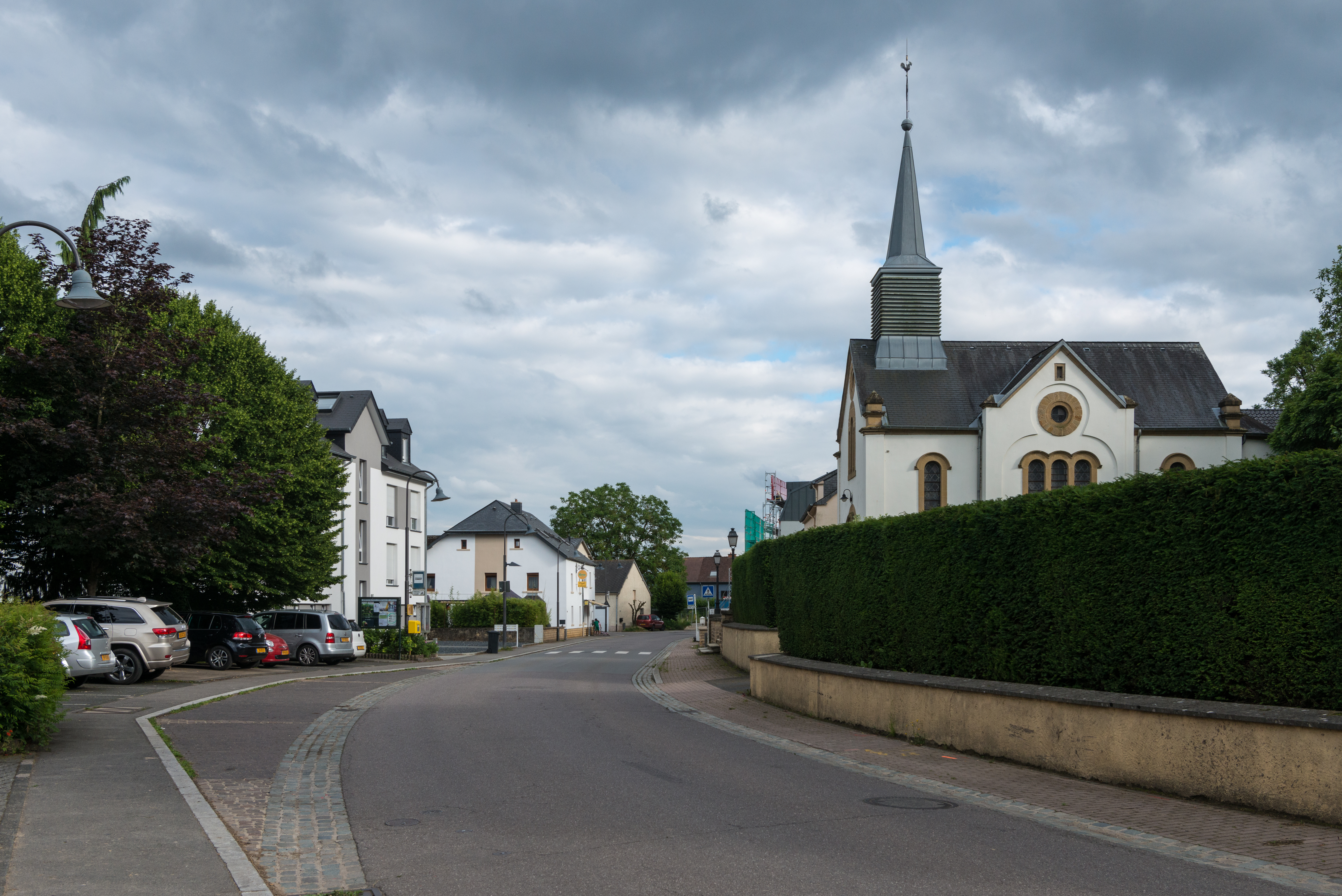 De CR123, hei d'Route de Mersch / Mierscherstrooss, zu Gousseldeng, lénks d'«Place Jean-Unsen».